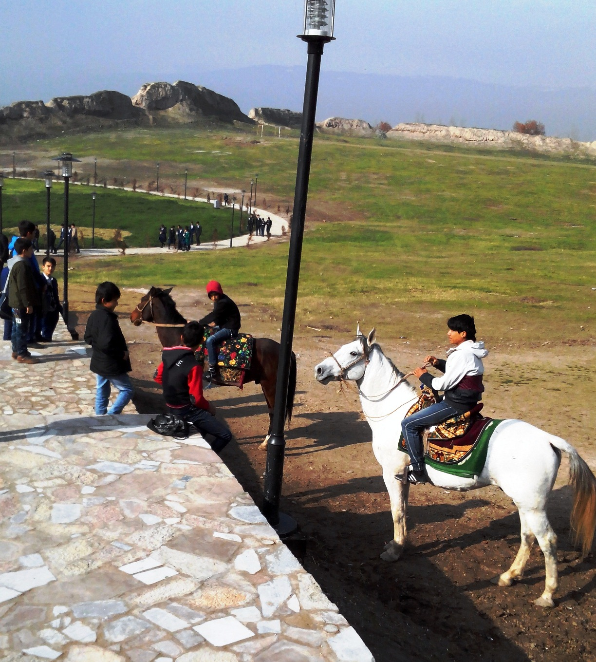 Верховая езда на лошади в Таджикистане Тоҷикӣ: Аспсаворӣ дар Тоҷикистон